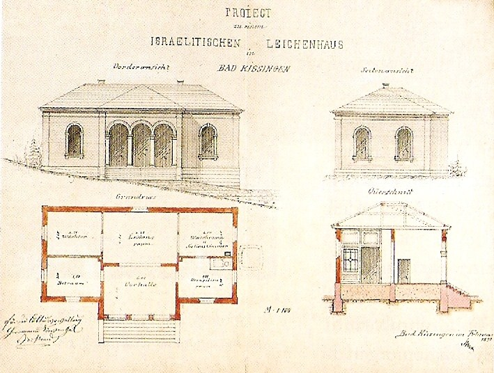 Planzeichnung zum Bau des Taharahauses auf dem Jüdischen Friedhof Bad Kissingen im Jahr 1891